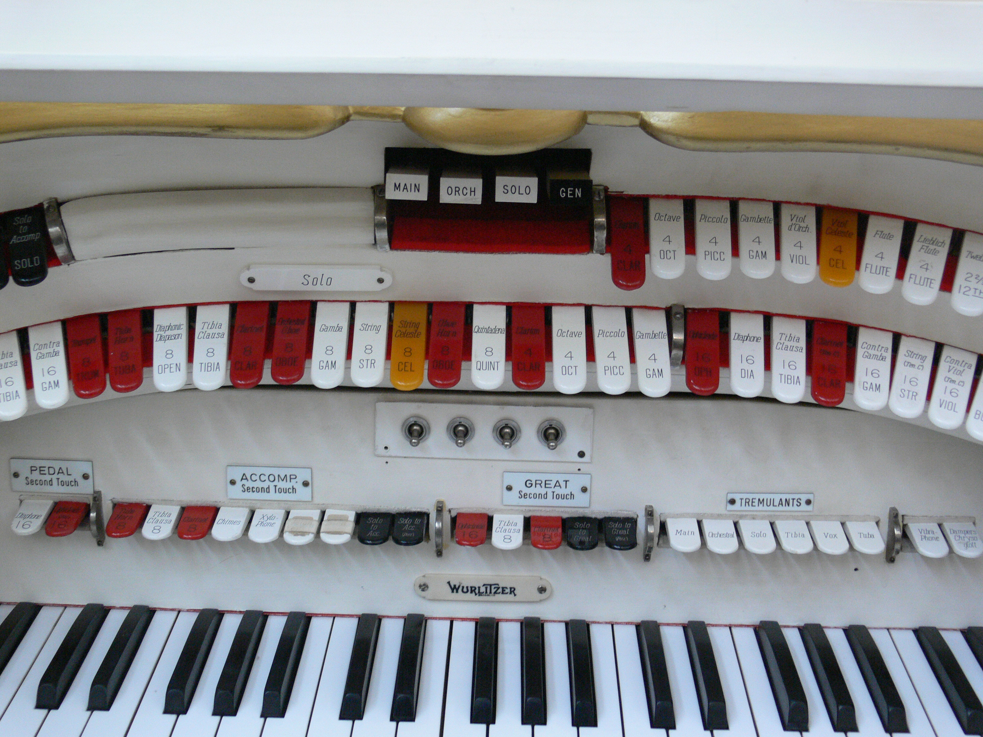 Mighty Wurlitzer, Musikinstrumenten-Museum Berlin Console